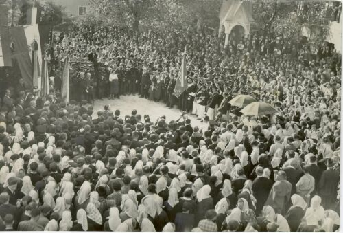 Odkritje spomenika Davorinu Jenku v Cerkljah